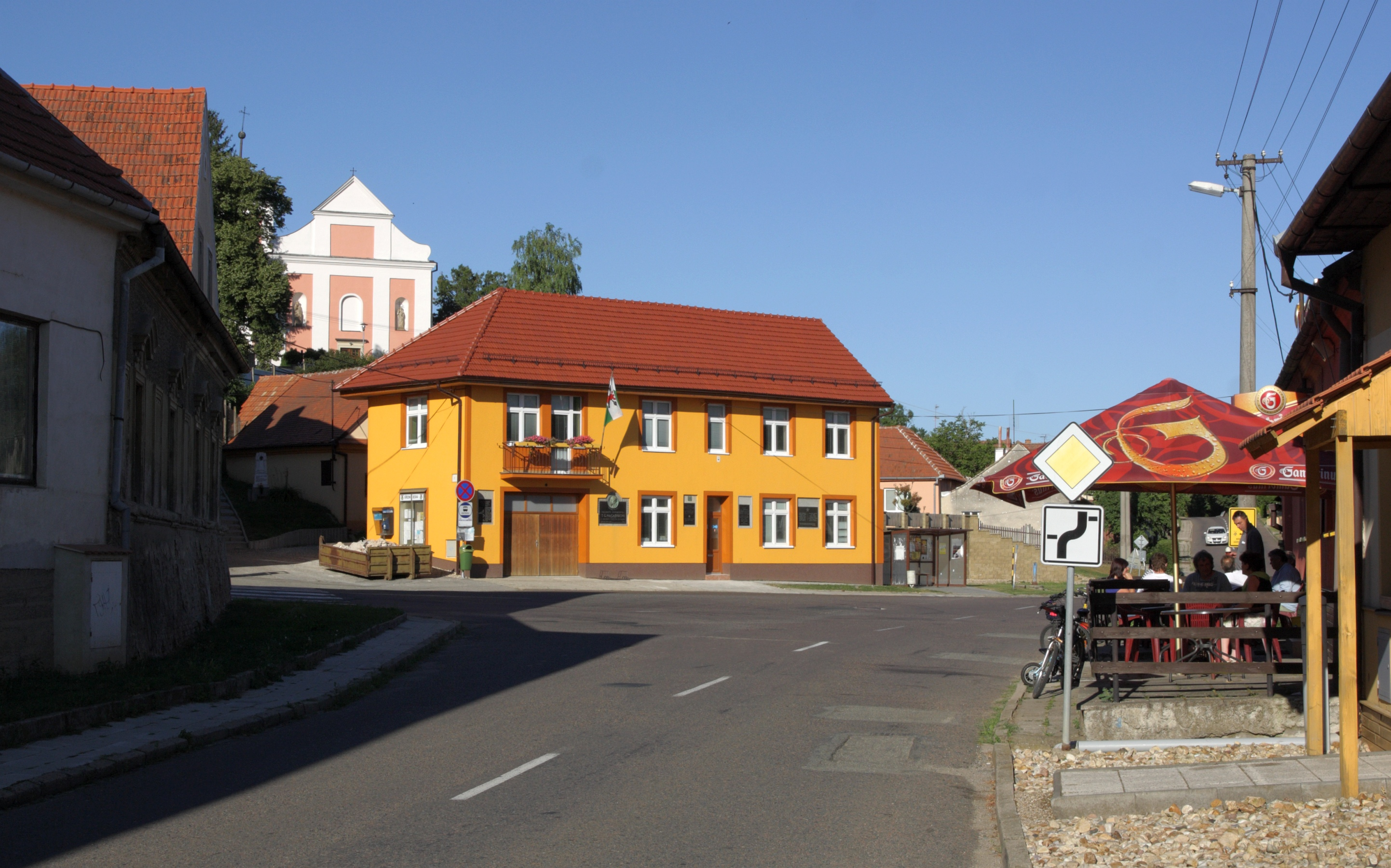 Velké Hostěrádky - náves s obecním úřadem, v pozadí kostel svatého Šebestiána, Rocha a Rozálie. Po levé straně silnice bývalý zájezdní hostinec.